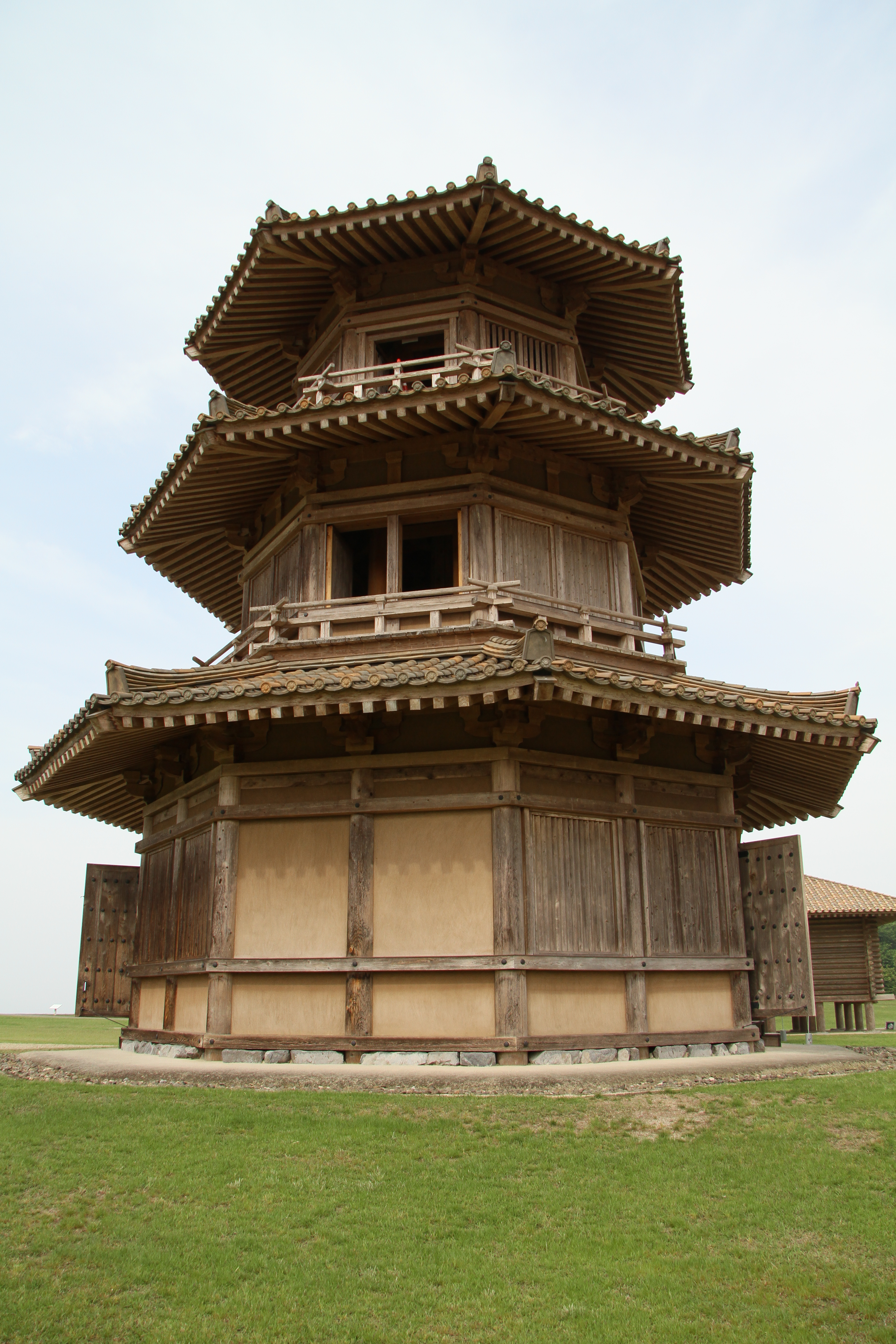 鞠智城復元鼓楼